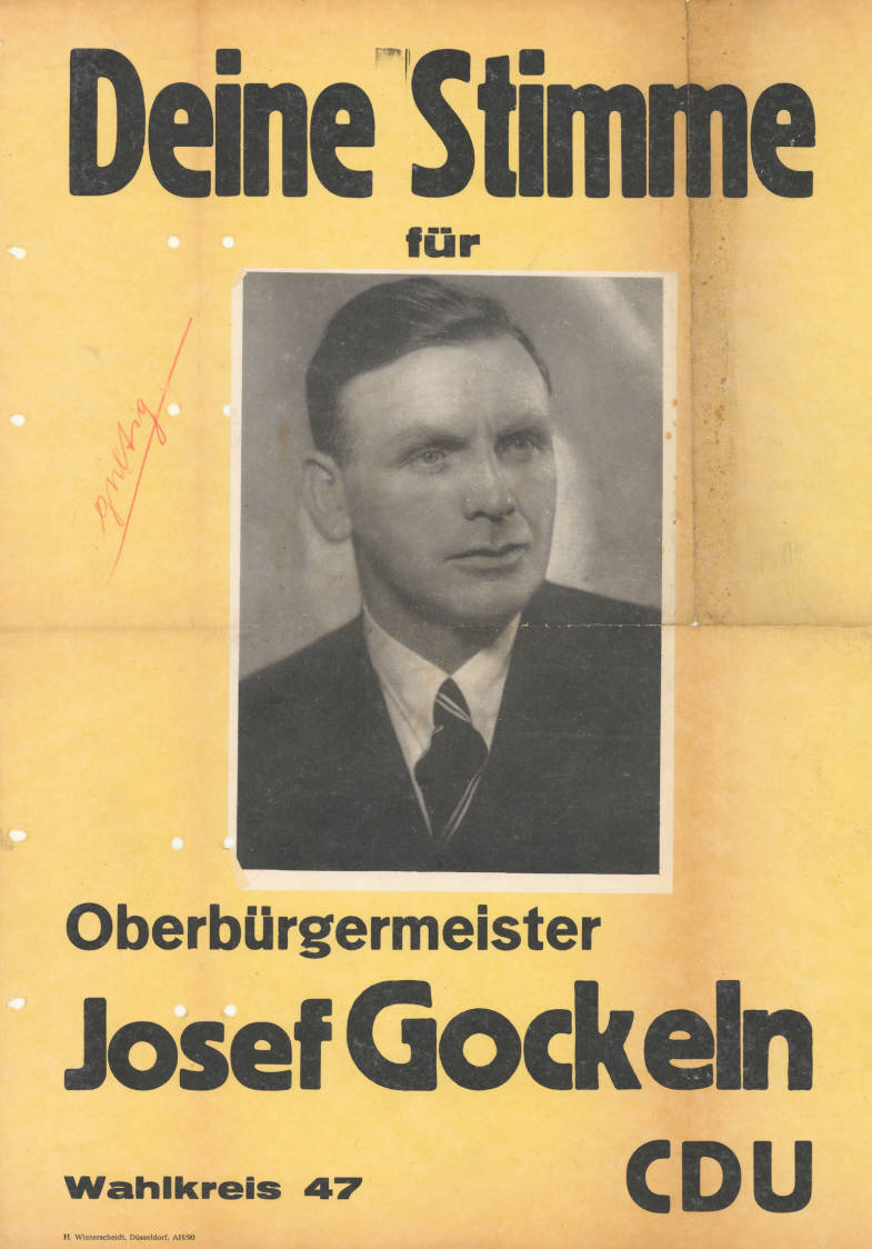 Deine Stimme für Oberbürgermeister Josef Gockeln Wahlkreis 47 CDU Abbildung: Porträtfoto Kommentar: Das Foto ist aufgeklebt Handschriftlich mit 'gültig' signiert Plakatart: Kandidaten-/Personenplakat mit Porträt Drucker_Druckart_Druckort: H. Winterscheidt, Düsseldorf, AH/90 Objekt-Signatur: 10-009 : 249.2 Bestand: Landtagswahlplakate Nordrhein-Westfalen (10-009) GliederungBestand10-18: Landtagswahlplakate Nordrhein-Westfalen (10-009) » Landtagswahl am 18.6.1950 » CDU » mit Porträtfoto Lizenz: KAS/ACDP 10-009 : 249.2 CC-BY-SA 3.0 DE